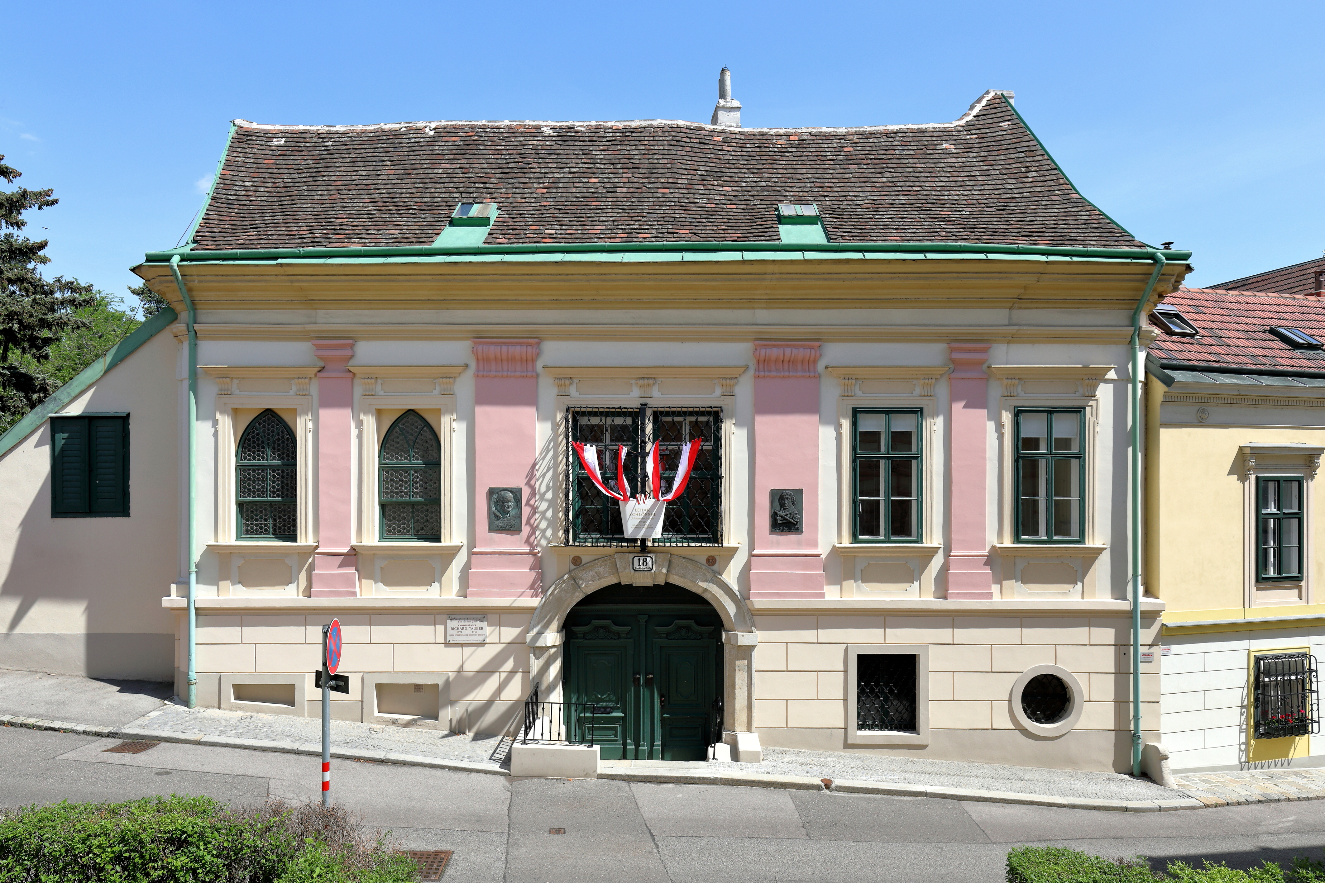 Der hackhofergassenseitige Trakt des Lehar-Schlössls in Nussdorf, ein Bezirksteil des 19. Wiener Gemeindebezirkes Döbling.Ursprünglich war es ein Freihof, der 1737 in den Besitz von Joachim Georg Gschwandner gelang. Dieser ließ das Gebäude umbauen und gab ihm im Wesentlichen sein heutiges Aussehen, obwohl es später auch noch mehrfach umgebaut wurde. 1803 kaufte Emanuel Schikaneder das Schlössl, daher auch der Name Schikaneder-Schlössl, und von 1932 bis zu seinem Tod gehörte es dem Operettenkomponisten Franz Lehár.